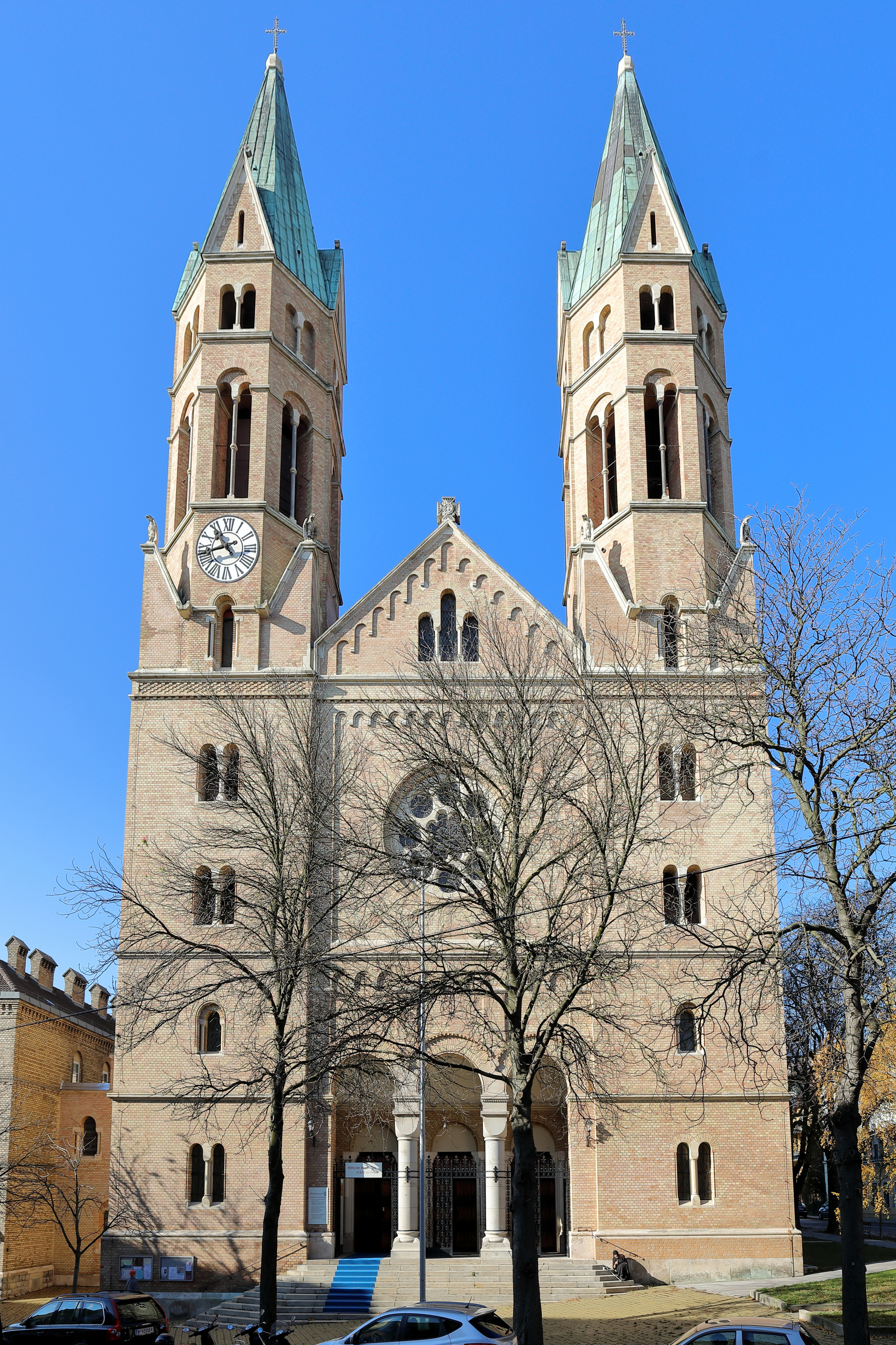 Ostansicht der Karmeliterkirche mit ihrer Doppelturmfassade im 19. Wiener Bezirk Döbling. Die Kirche in Form einer neuromanischen Basilika mit drei Schiffen wurde von 1898 bis 1901 nach Plänen des Architekten Richard Jordan errichtet.